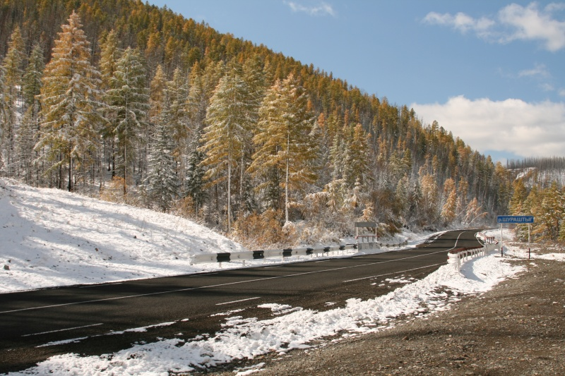 951-й км старого маршрута трассы М54: Шуурмакский перевал, мост через речку Шураштыг